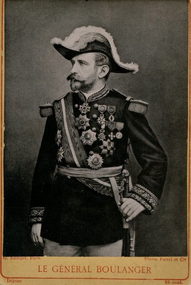 Général Georges Boulanger, carte photographique (vers 1890).